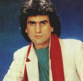 foto del cantautore italiano Toto Cutugno